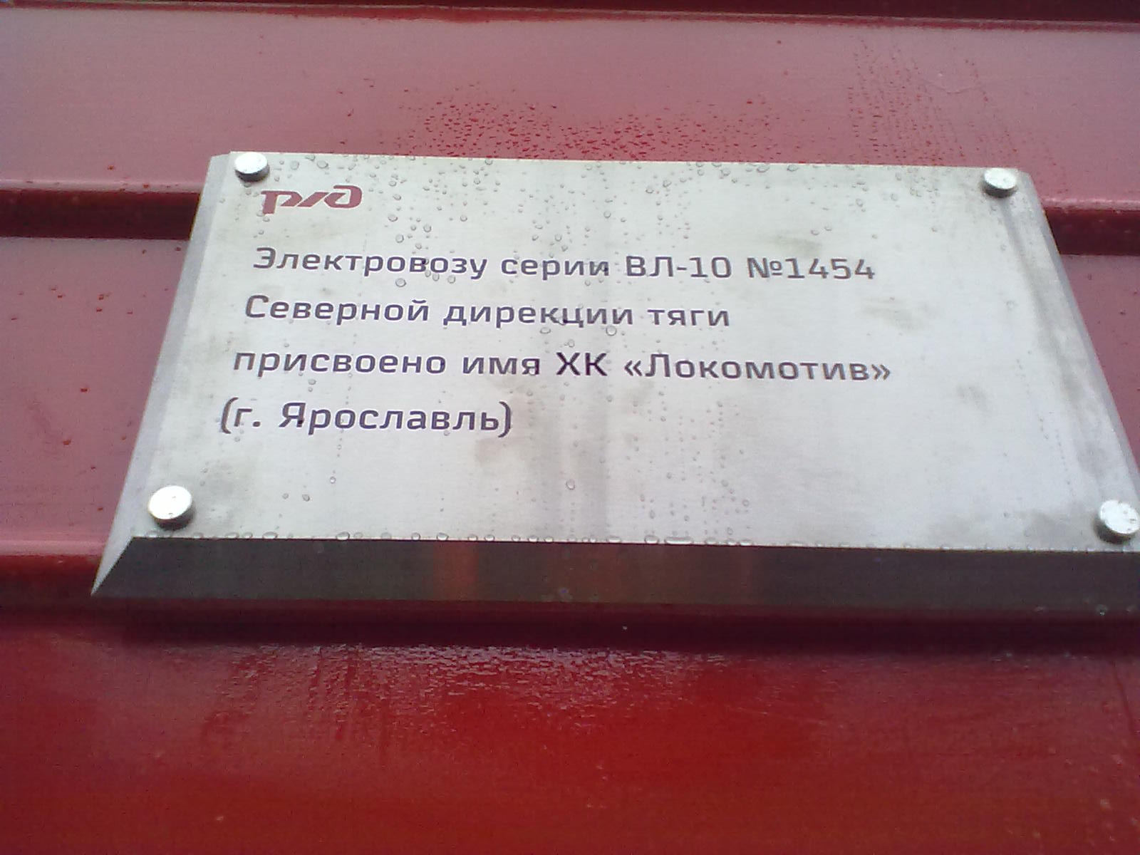 Фото сделано в городе Ярославль, на станции Ярославль-Главный